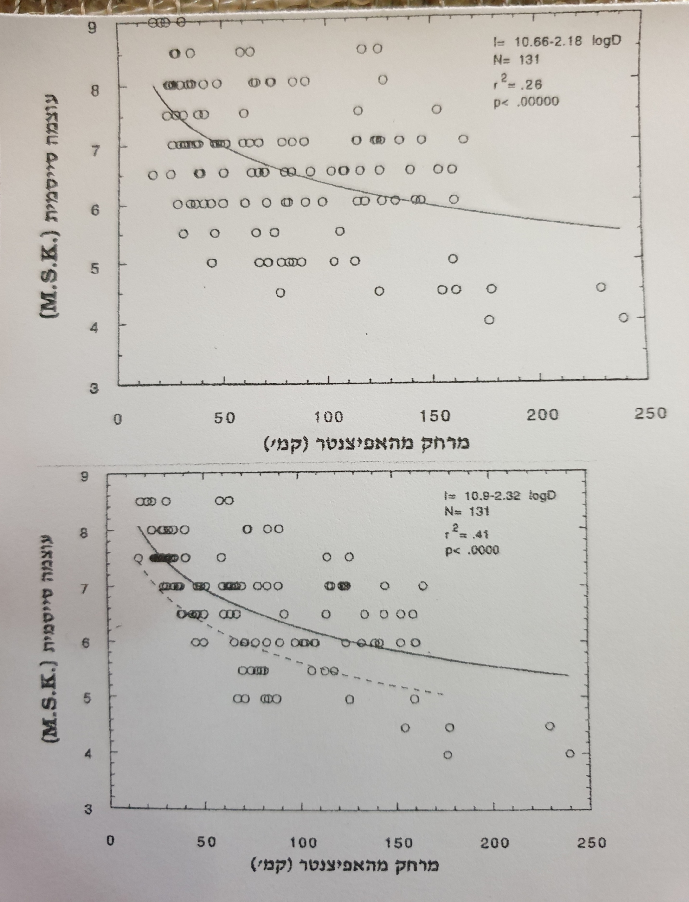 Regular attenuation Curve & without site effect of the 1927 earthquake in the Holy Land